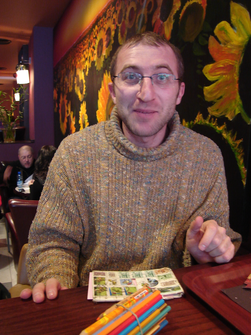 Nikolaj Bojkov, Bulgarian writer, poet and translator from Hungarian in Sofia